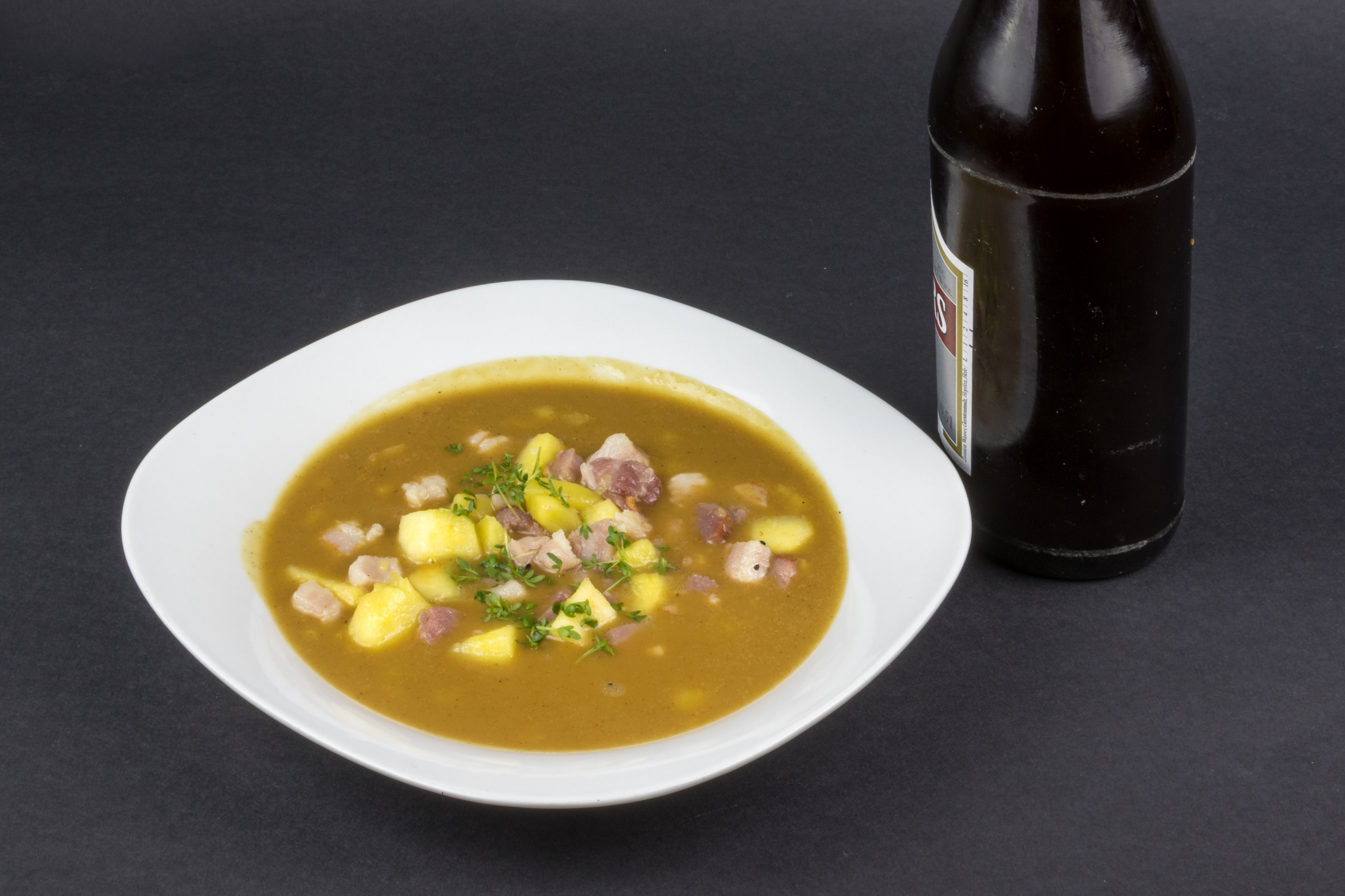 Biersuppe auf Basis von Altbier mit Speck und Apfelstückchen